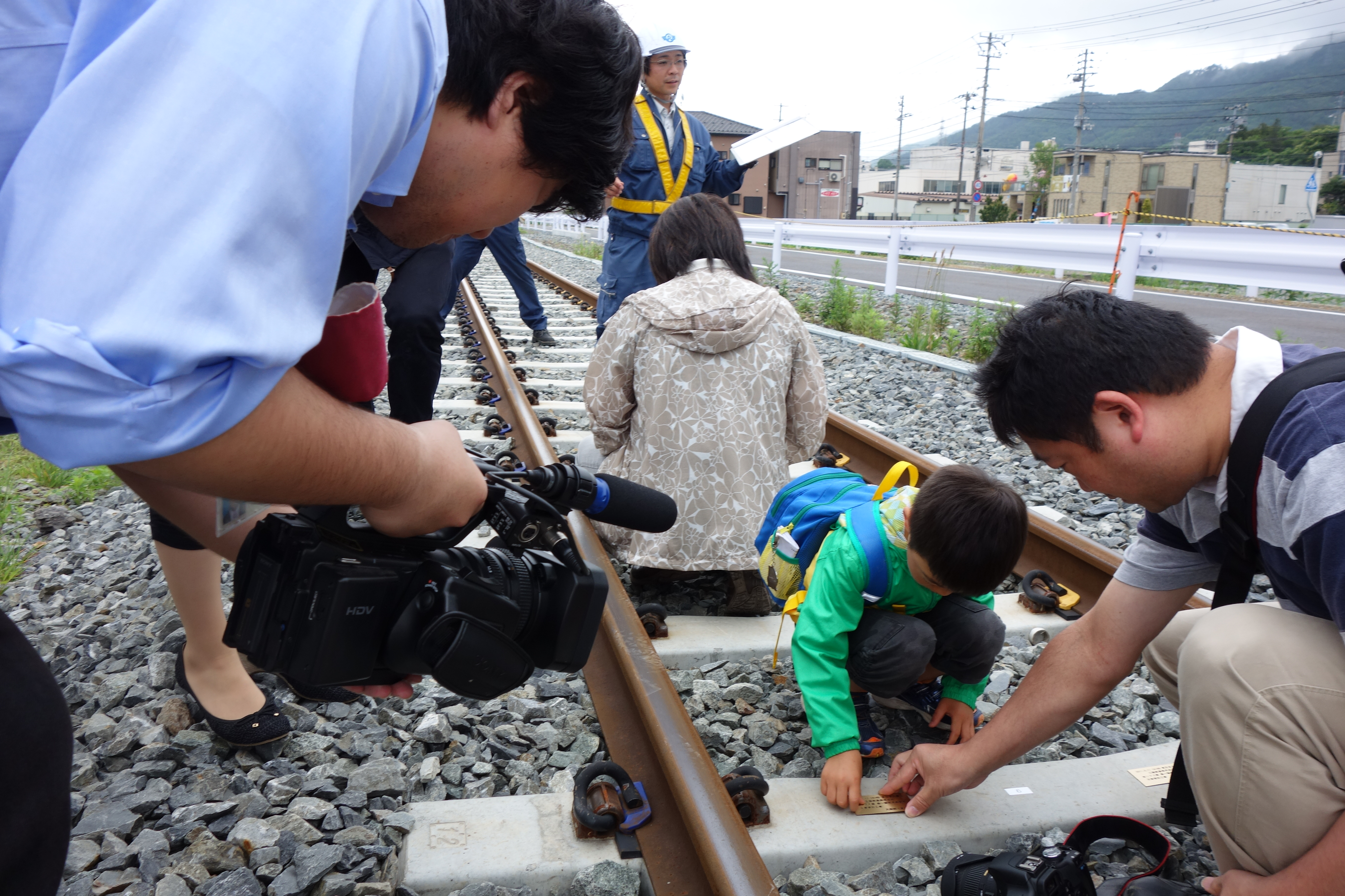 三陸鉄道支援プログラム 「枕木に名前を残そう！」ツアー第二弾（大船渡市盛町内ノ目～馬場、2013年6月30日）